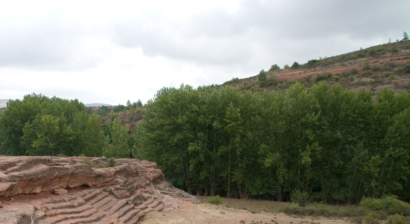 Río Manzanares a su paso por el graderío de Tiermes